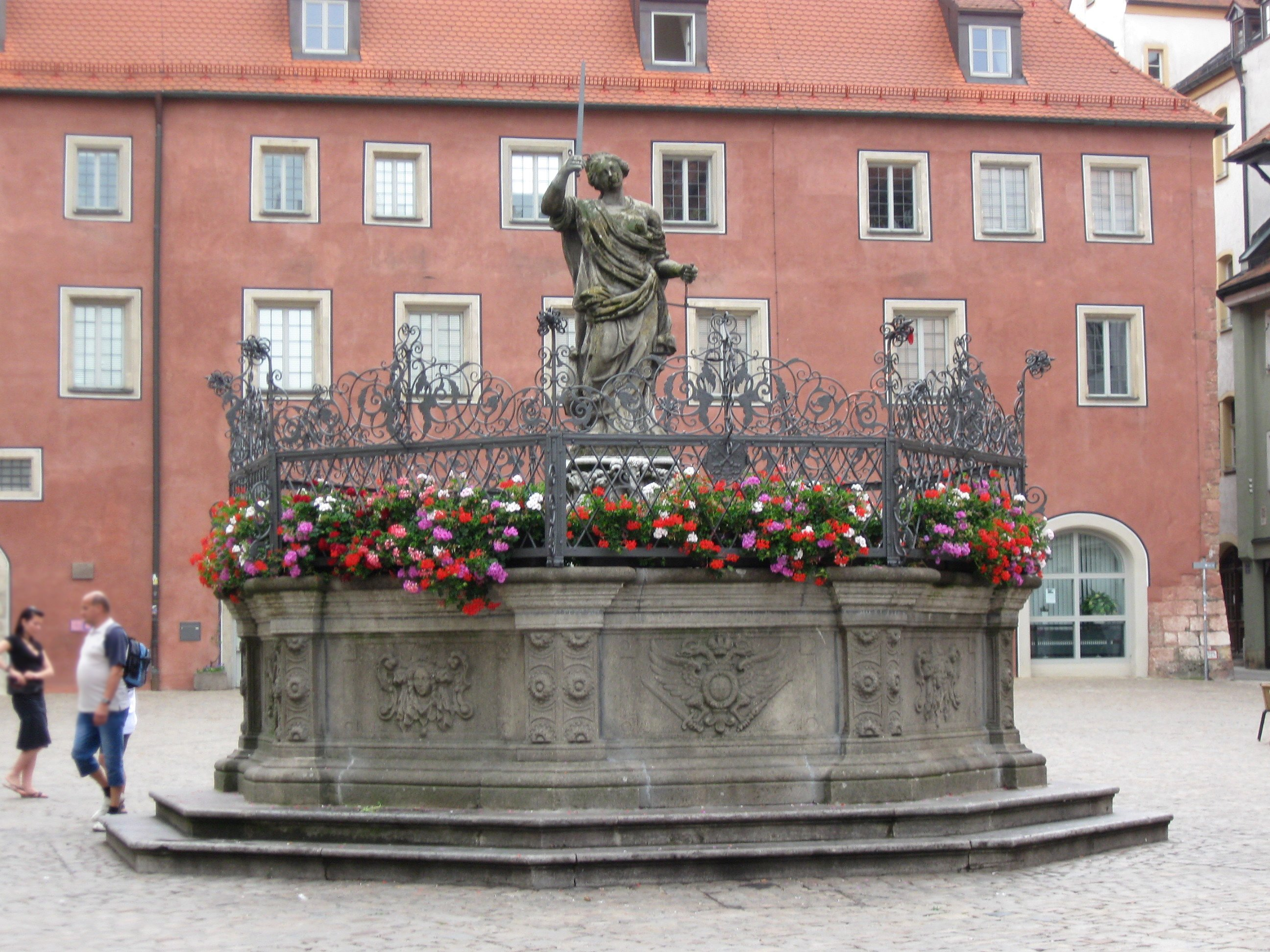 Haidplatz. Brunnen, sog, Justitiabrunnen, achteckiges Brunnenbecken mit allegorischer Brunnenfigur der Justitia und Ziergitter, Sand- und Kalkstein, frühbarock, 1656-59 von Leoprand Hilmer, Gitter 1592.